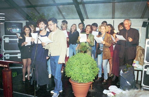 Verschillende acteurs uit Goede tijden, slechte tijden in 1994